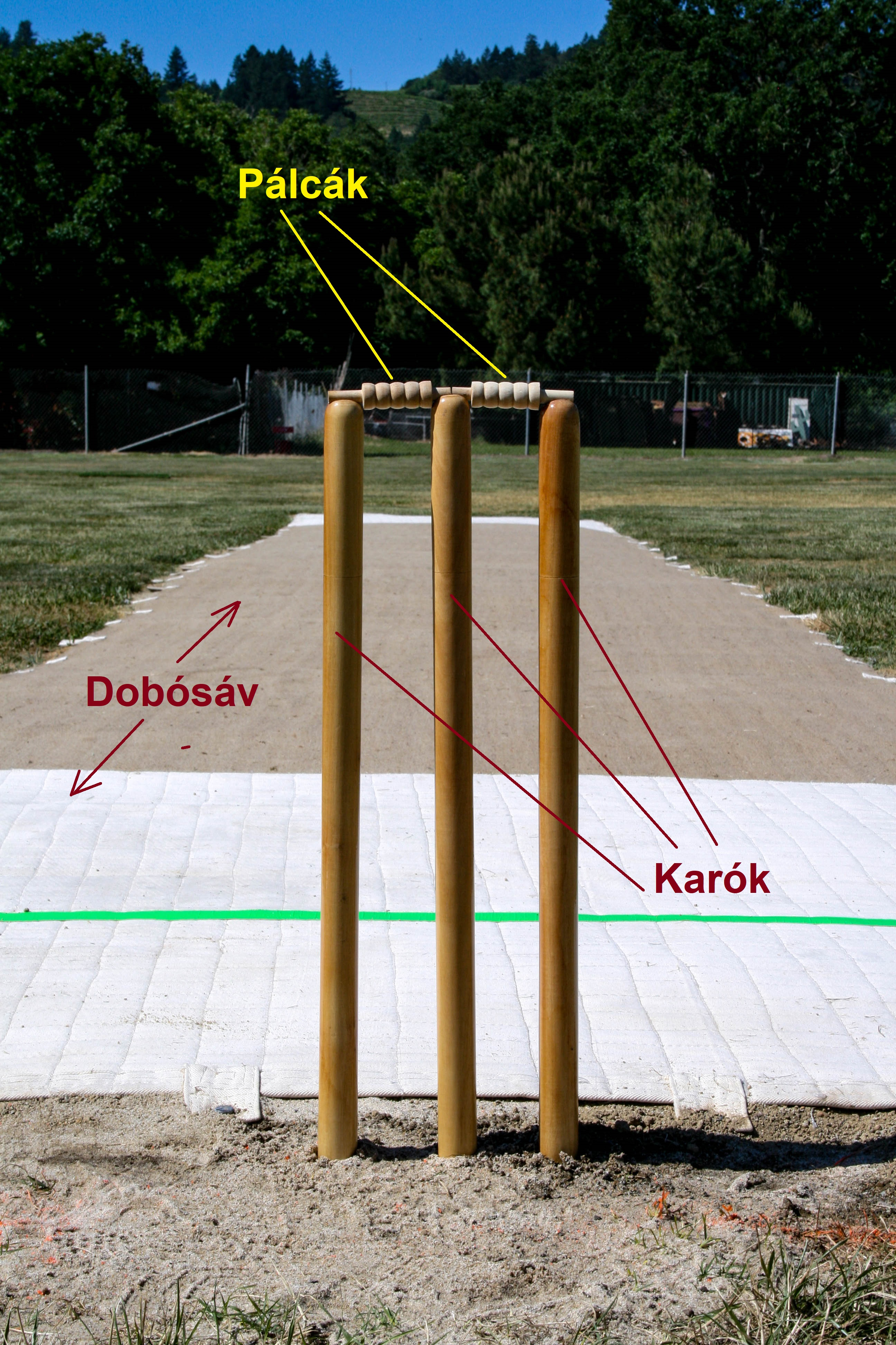 Krikettkapu